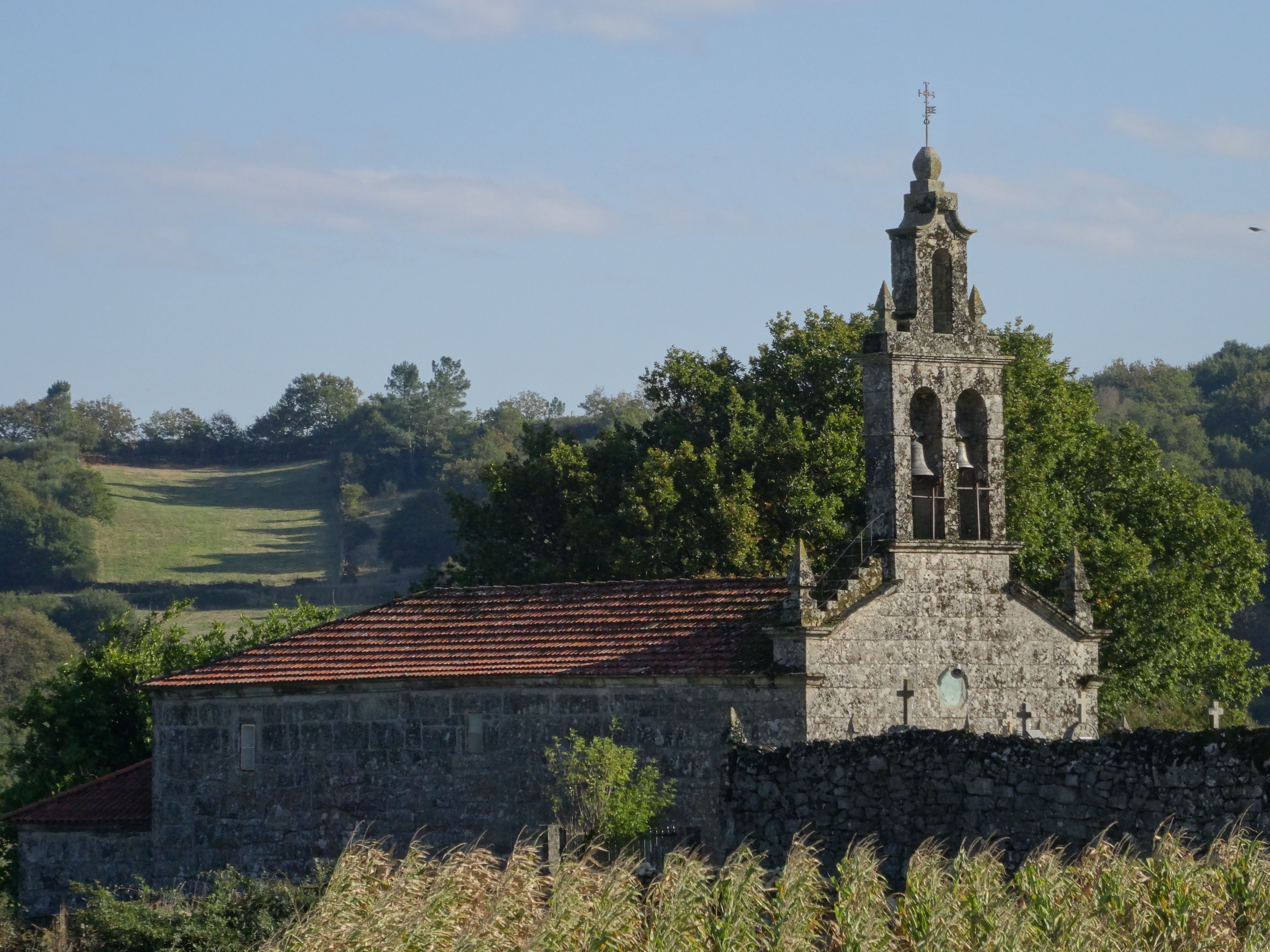 Ver título.